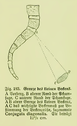 Fig. 183. Grenze des kleinen Beckens. A Vorberg, B oberer Rand der Schamfuge, C unterer Rand der Schamfuge. A B obere Grenze des kleinen Beckens, A C das wichtigste Beckenmaß zur Bestimmung der Beckengröße, sogenannte Conjugata diagonallis. Sie beträgt 12½ cm.